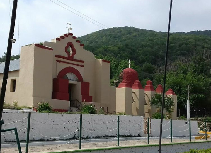 Parroquia de San Nicolás Tolentino, construido en el siglo XVIII, la construcción de esta parroquia en 1769, coincide con el descubrimiento del antiguo Real de San Nicolás.